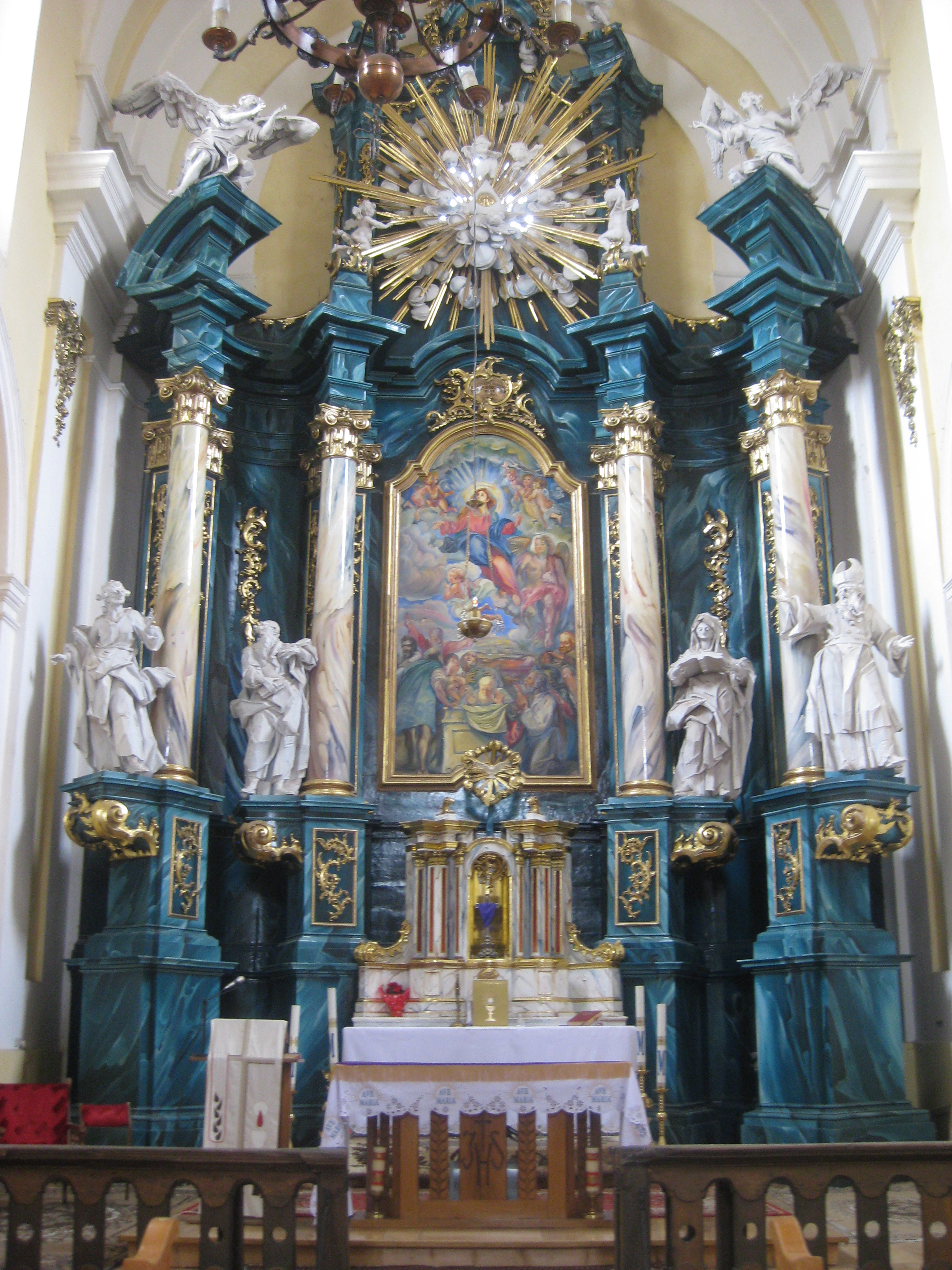 Костел Внебовзяття Пресвятої Діви Марії (Бучач)